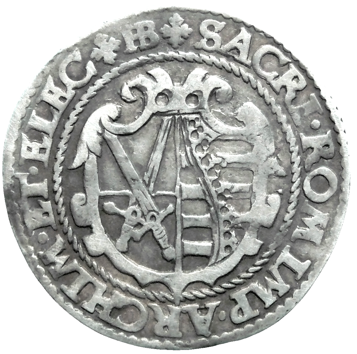 Vierteltaler 1573 („Oerter“ = Ortstaler) Wert = 17 Kreuzer = 6 Groschen August Herzog von Sachsen und Kurfürst (1553-1586) Prägung 1572-1574 und 1576-1586 Münzstätte Dresden, Münzmeister Hans Biener (1556-1604)Prägung nach Augsburger Reichsabschied vom 30. Mai 1566 im 10⅕-Gulden-Fuß mit 36 Stück aus der Feinen Mark, Feingewicht: 6,496 g bei 14 Lot 4 Grän = 888,889‰ Silber Gewicht: 7,19 g Durchmesser: 29,36-29,72 mm Dicke: 1,23 mmhochgeteiltes kursächsisches Wappen in einer mit symmetrischen Ornamenten verzierten Kartusche innerhalb einer Kreisschnur; Fortsetzung der Titelumschrift zwischen Rändelung und innerer Kreisschnur nach Rosette oben von rechts beginnend SACRI ◦ ROM IMP ◦ ARCHIM ◦ ET ◦ ELECT und weitere Rosette, danach Münzmeisterzeichen HB (…SACRI ROMANI IMPERII ARCHMARSCHALLUS ET ELECTOR = … des Heiligen Römischen Reiches Erzmarschall und Kurfürst)